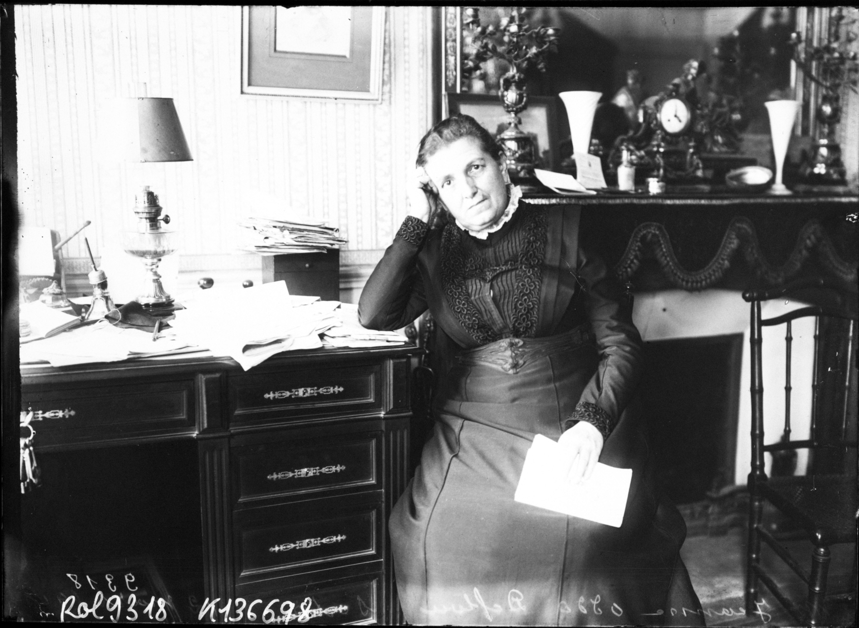 Portrait de suffragette par l'Agence Rol en 1910.